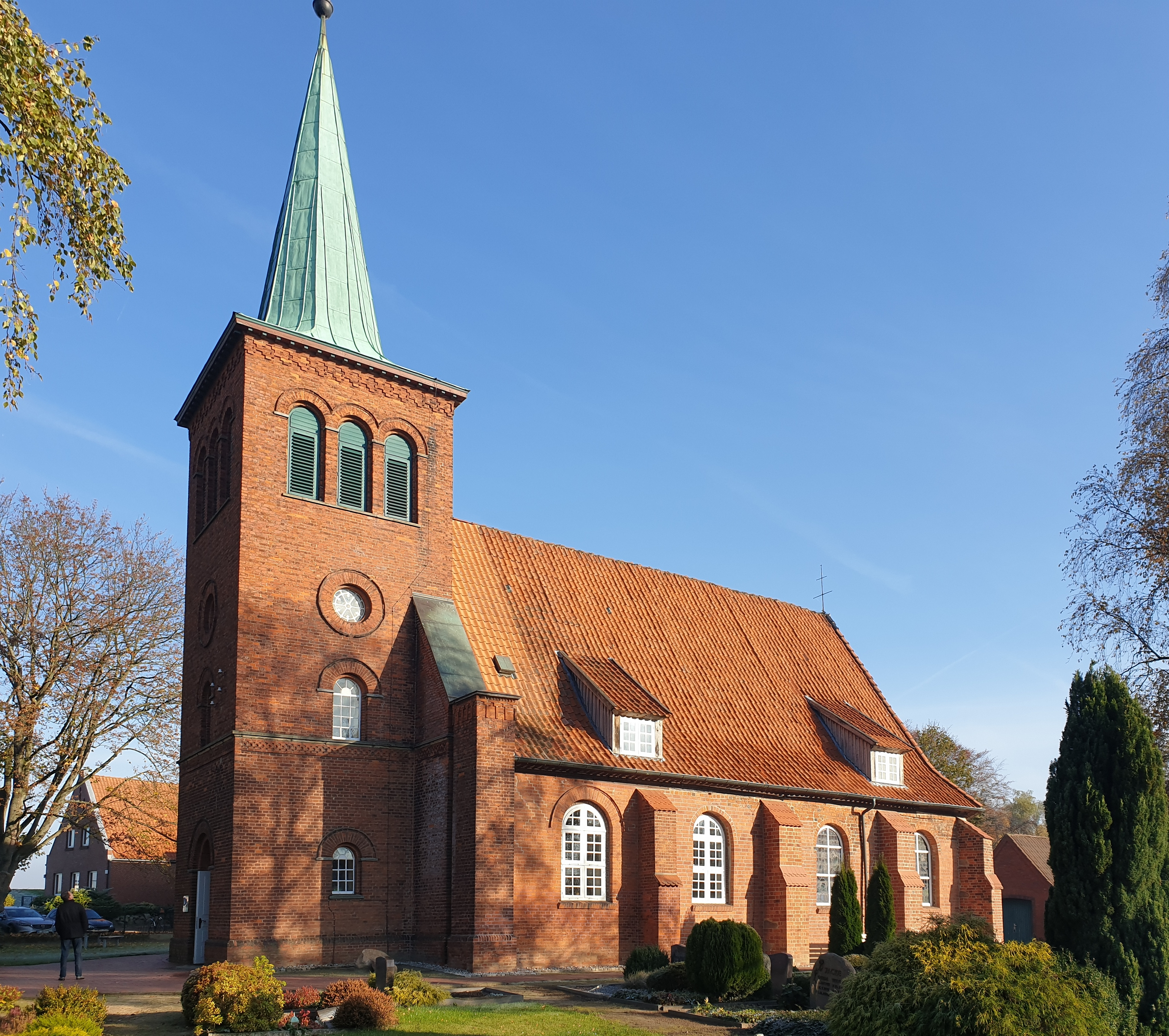 St. Marien in Drennhausen, Samtgemeinde Elbmarsch